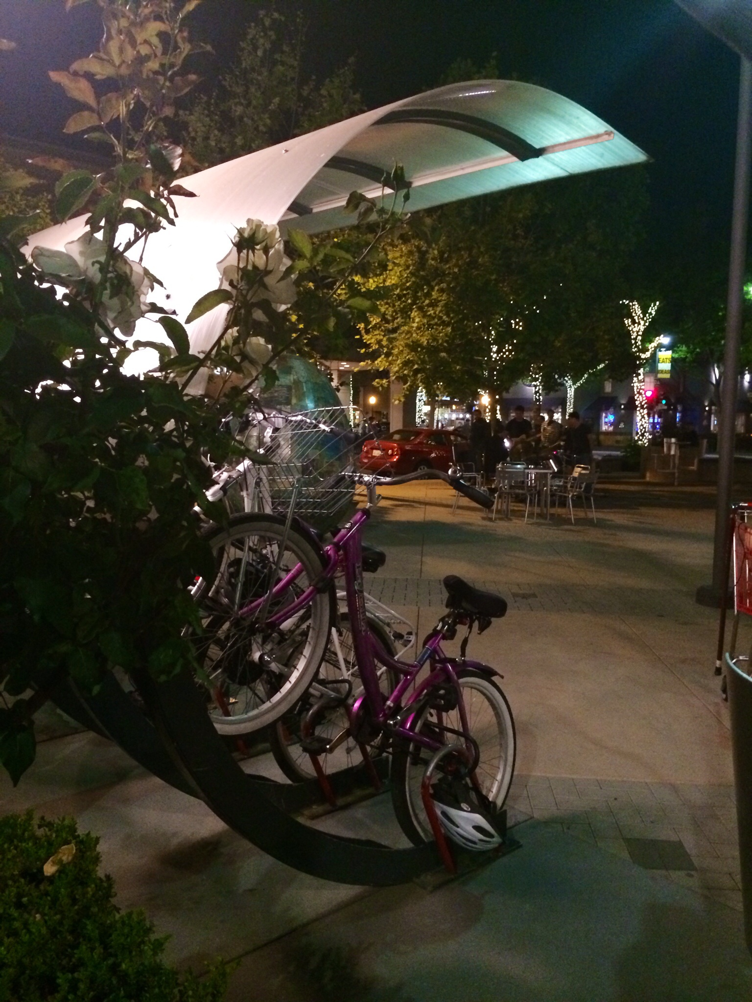 Bike Arcs Lytton Plaza Palo Alto, CA